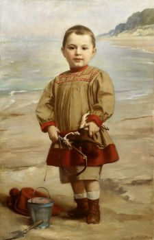 Mädchen (?) mit Spielzeugpferd am Ostseestrand. Öl auf Leinwnd, r. u. sign. u. dat. 1901. 114,5 cm x 74,5 cm.